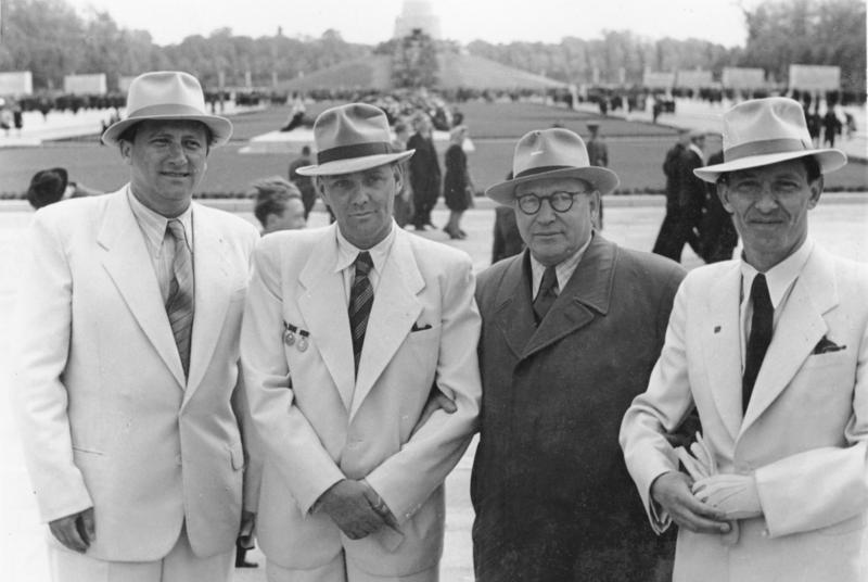 Berlin-Treptow, sowjetische Ehrenmal, Einweihung ADN-ZB/SNB Ehrenmal der sowjetischen Armee Am 8.5.1949 vormittag um 11 Uhr fand im Treptower Park in Berlin die feierliche Einweihung des Ehrenfriedhofes mit dem Denkmal für die im Kampf um Berlin gefallenen Kämpfer der Sowjetarmee statt UBz: ( 2. von links) Der Erbauer des Denkmals, der viermalige Stalinpreisträger J.W. Wutschetitsch. Abgebildete Personen: Wutschetitsch, Jewgeni W.: Bildhauer, Stalin-Preis 1949, Lenin-Preis 1970, Sowjetunion (GND 118836773)